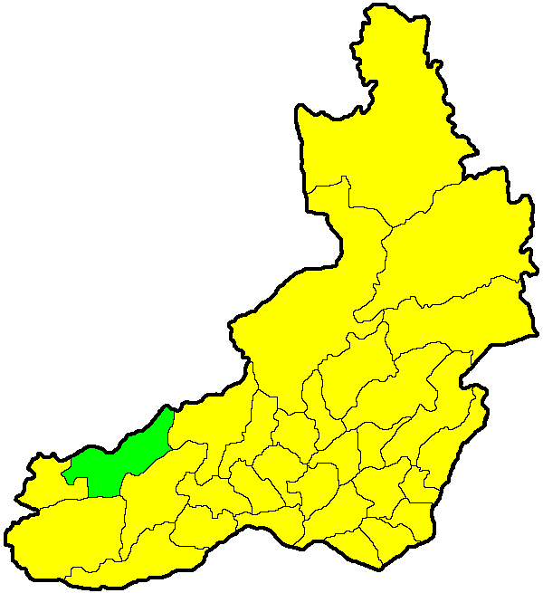 Хилокский район на карте Забайкальского района